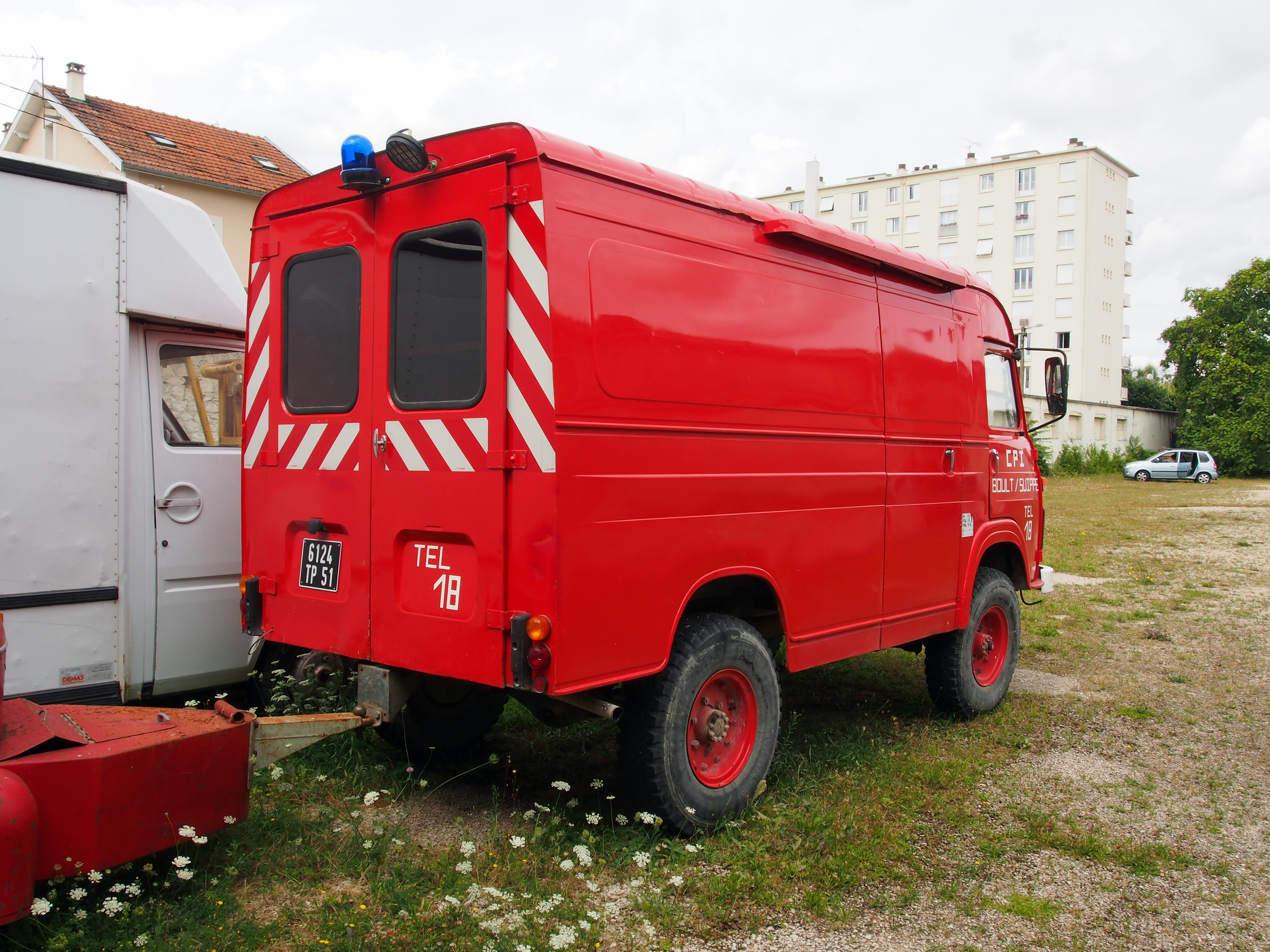 VPI Renault-Saviem SG4 - 4x4